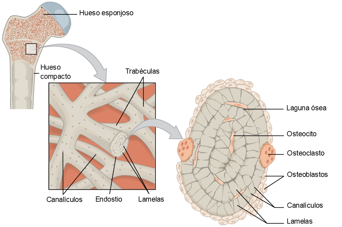 Estructura del tejido óseo esponjoso